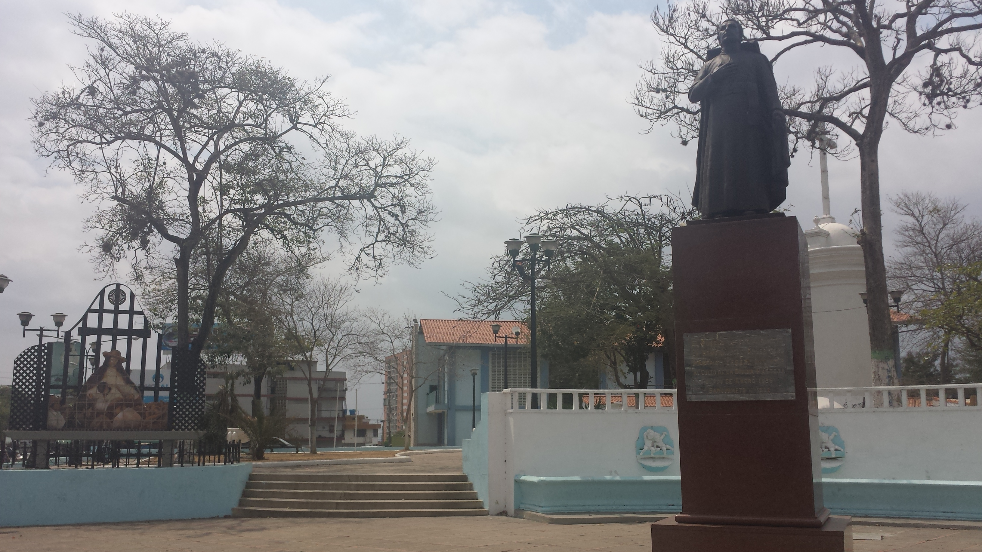 Plaza Macario Yépez en el horario matutino